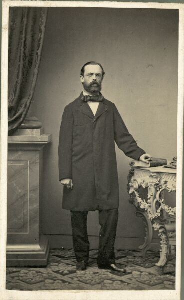 Porträt von Gustav Zeuner